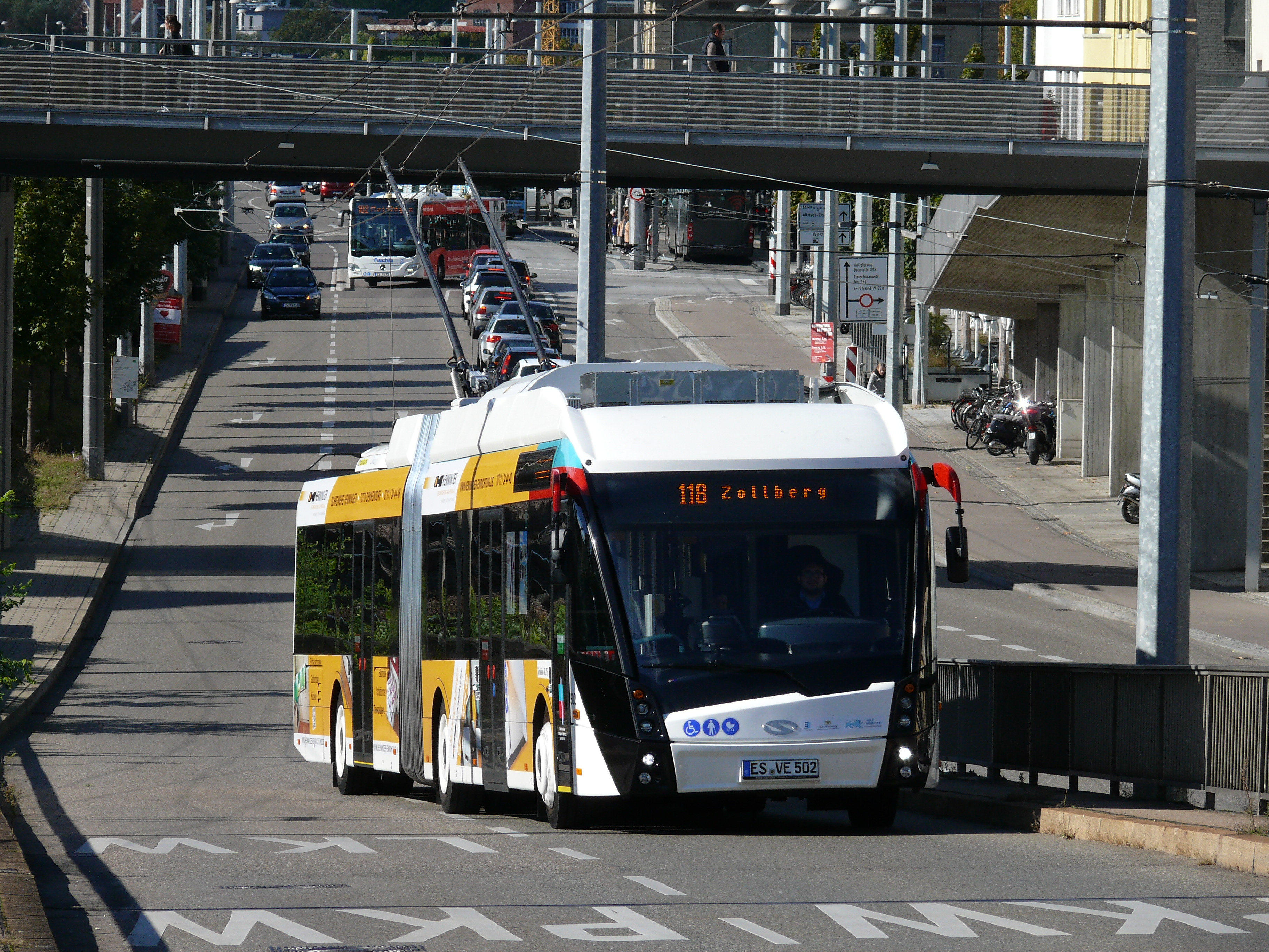 Ein Oberleitungsbus vom Typ Trollino "18,75 MetroStyle" des polnischen Herstellers Solaris in Esslingen am Neckar.